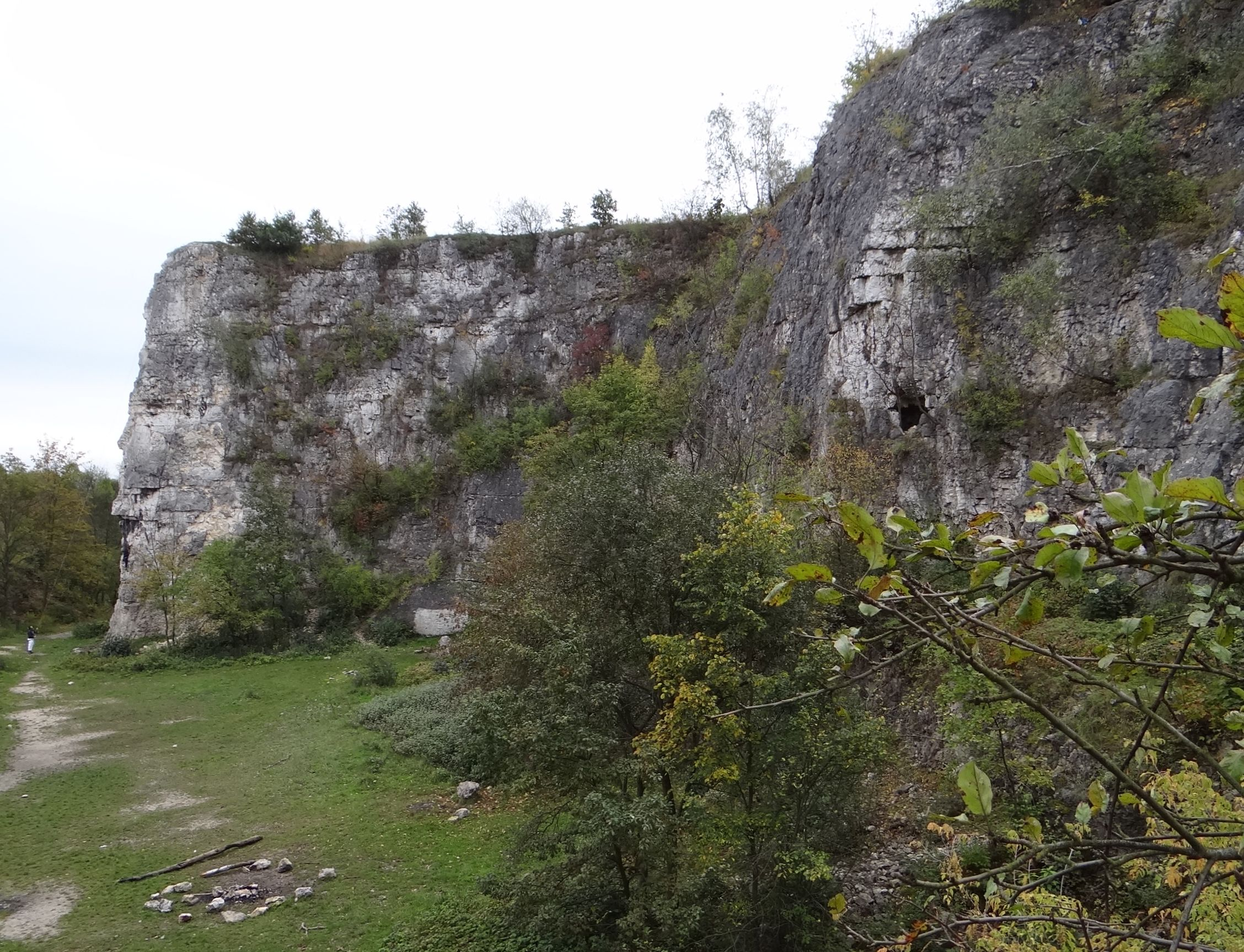 Baba Jaga i Szara Ścianka na Zakrzówku